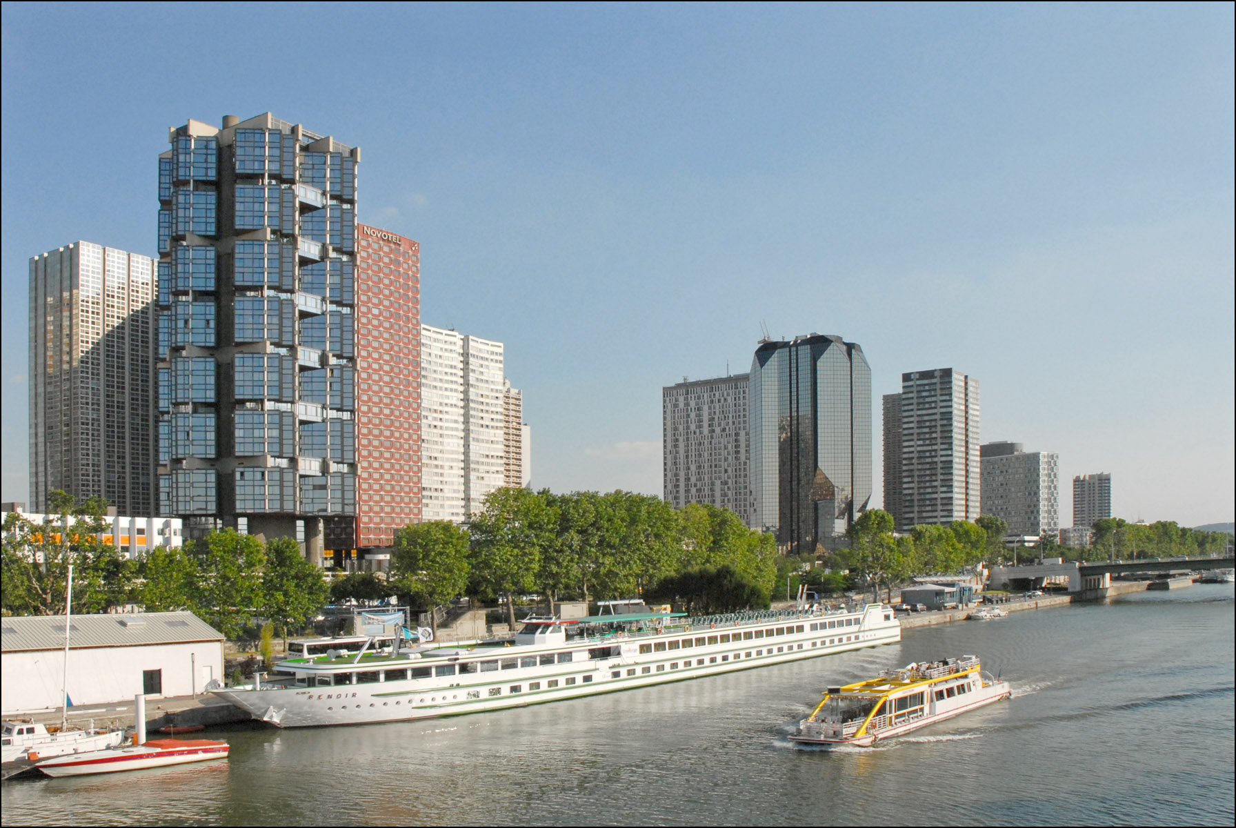 Fluss-Kreuzfahrtschiff Renoir in Paris